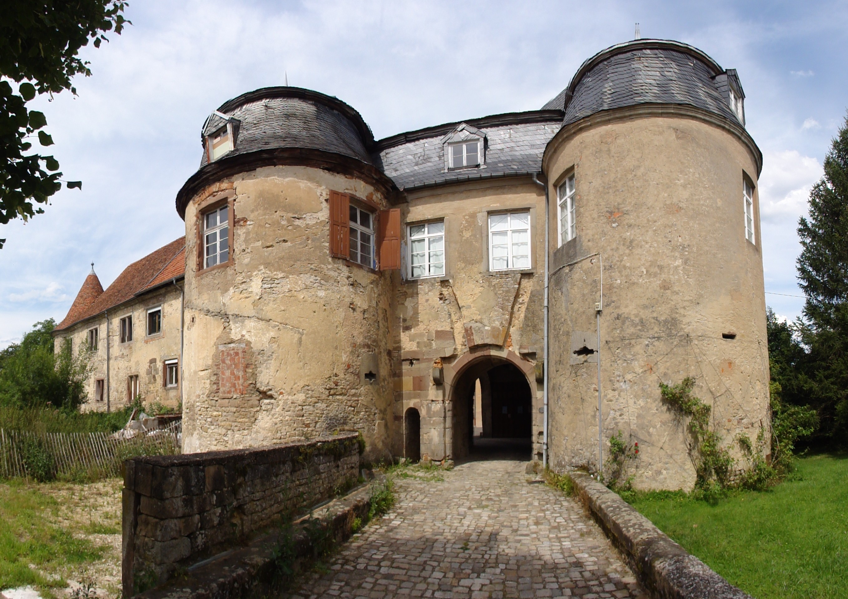 Alsace, Bas-Rhin, Château de Lorentzen (PA00085270, IA67005872).